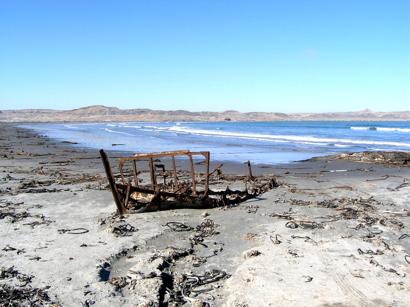 Diaz-Point nahe Luderitz, Grosse Bucht